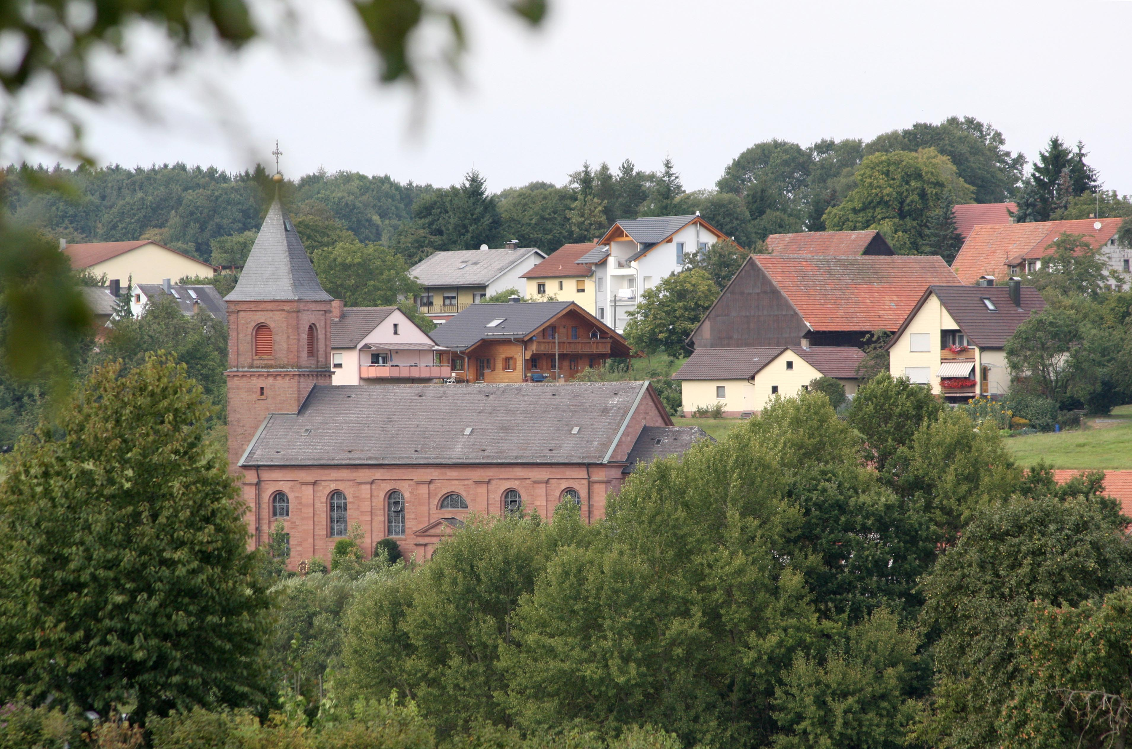 Donebach, Blick auf die Kirche St. Josef